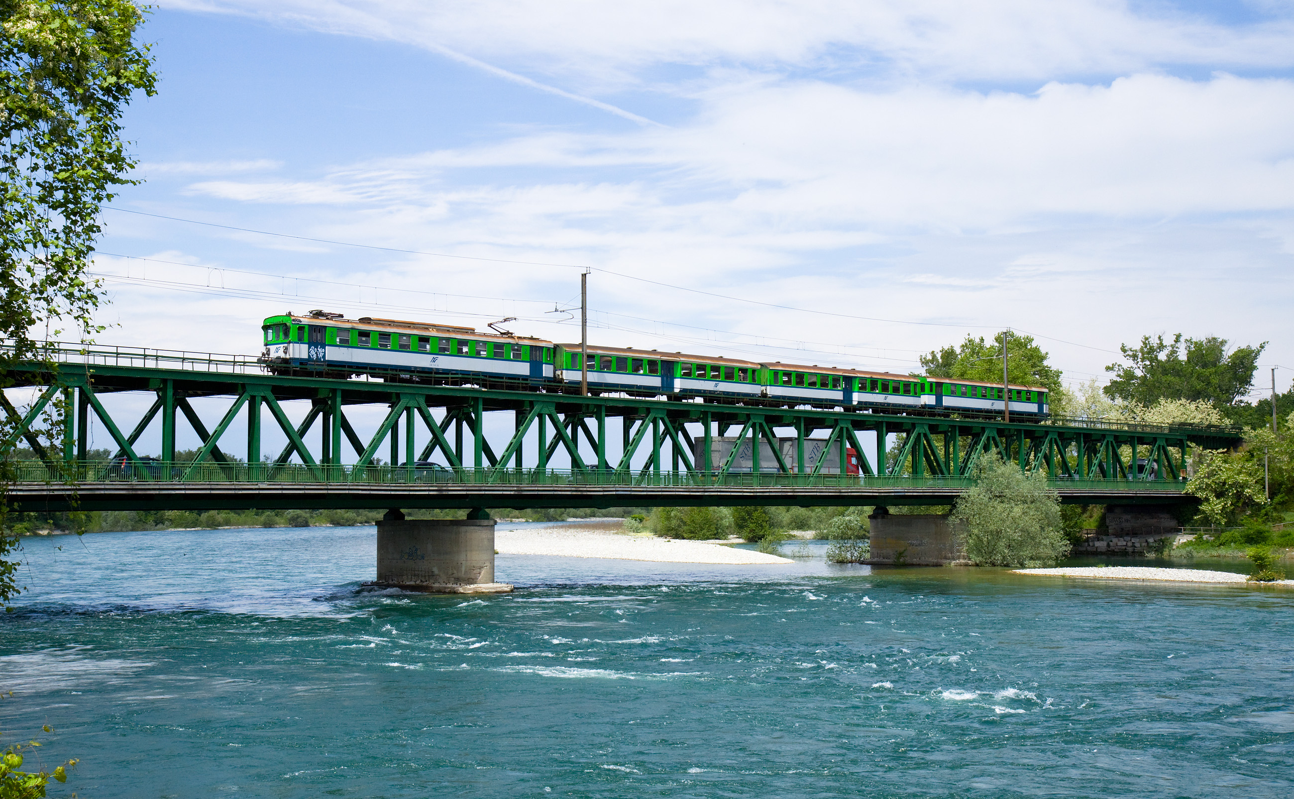 Treno delle Ferrovie Nord Milano trainato da un'elettromotrice E.740, in transito sul ponte sul Ticino presso Galliate